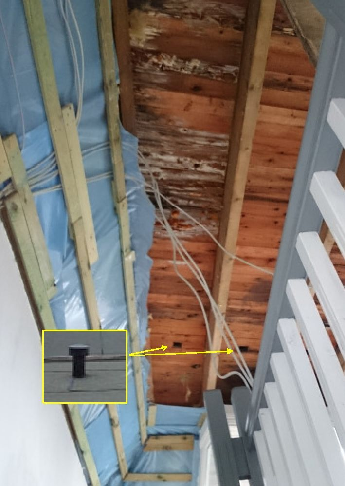 Flachdach mit Feuchteschaden durch Dampfsperre und Mineralwolle Feuchteschaden bei einem oben und unten dampfdichten Dach, Lüfterpilz hat begrenzte Reichweite